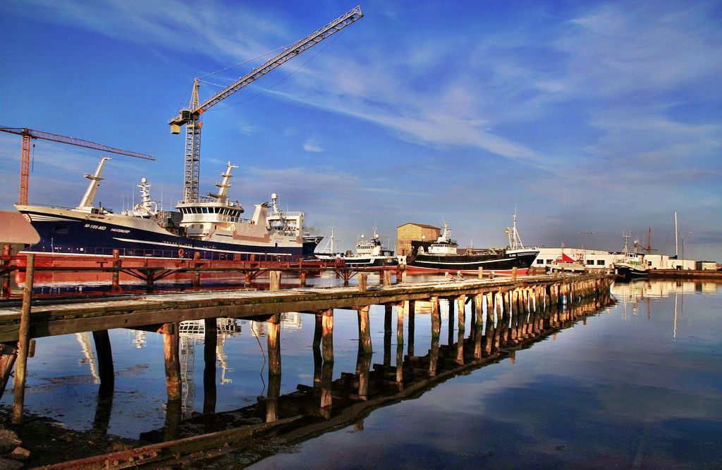 Skagen havn